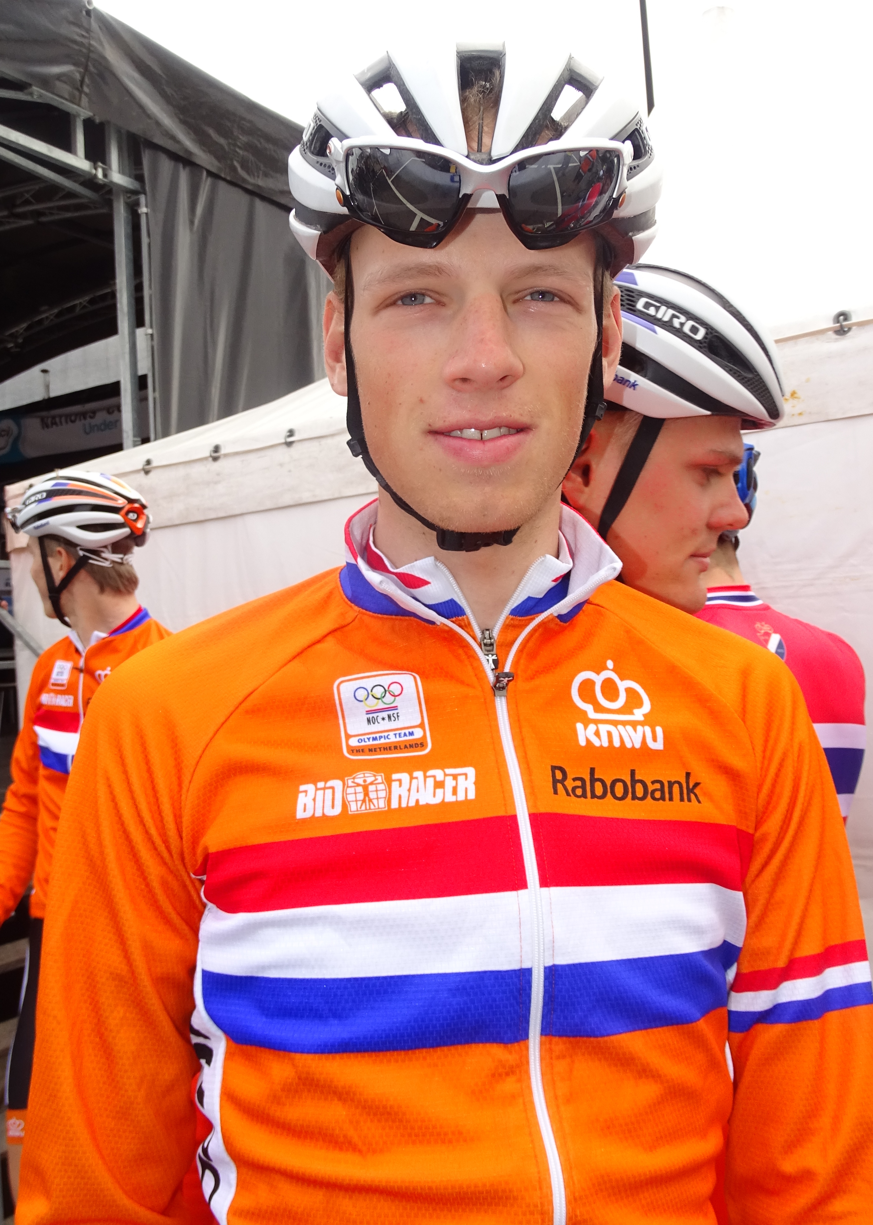 Reportage réalisé le samedi 11 avril à l'occasion du départ et de l'arrivée du Tour des Flandres espoirs 2015 à Audenarde, Belgique.